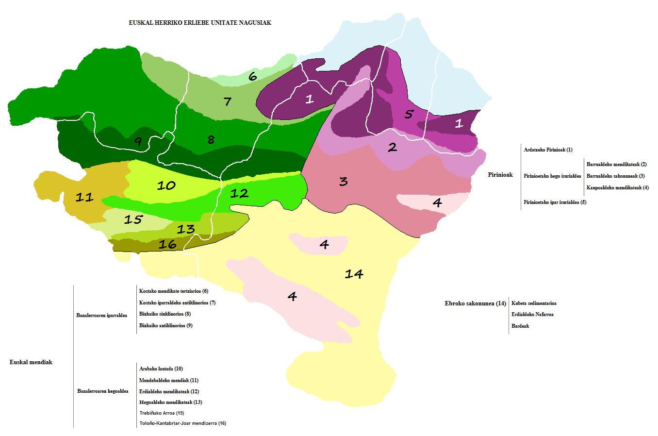 Euskal Herriko erliebe unitate nagusiak Pirinioak Ardatzeko Pirinioak (1) Pirinioetako hego isurialdea Barrualdeko mendikateak (2) Barrualdeko sakonuneak (3) Kanpoaldeko mendikateak (4) Pirinioetako ipar isurialdea (5) Euskal mendiak Banalerroaren iparraldea Kostako mendikate tertziarioa (6) Kostako iparraldeko antiklinorioa (7) Bizkaiko sinklinorioa (8) Bizkaiko antiklinorioa (9) Banalerroaren hegoaldea Arabako lautada (10) Mendebaldeko mendiak (11) Erdialdeko mendikateak (12) Hegoaldeko mendikateak (13) Trebiñuko arroa (15) Toloño-Kantabriar-Joar mendizerra (16) Ebroko sakonunea (14) Kubeta sedimentarioa Erdialdeko Nafarroa Bardeak